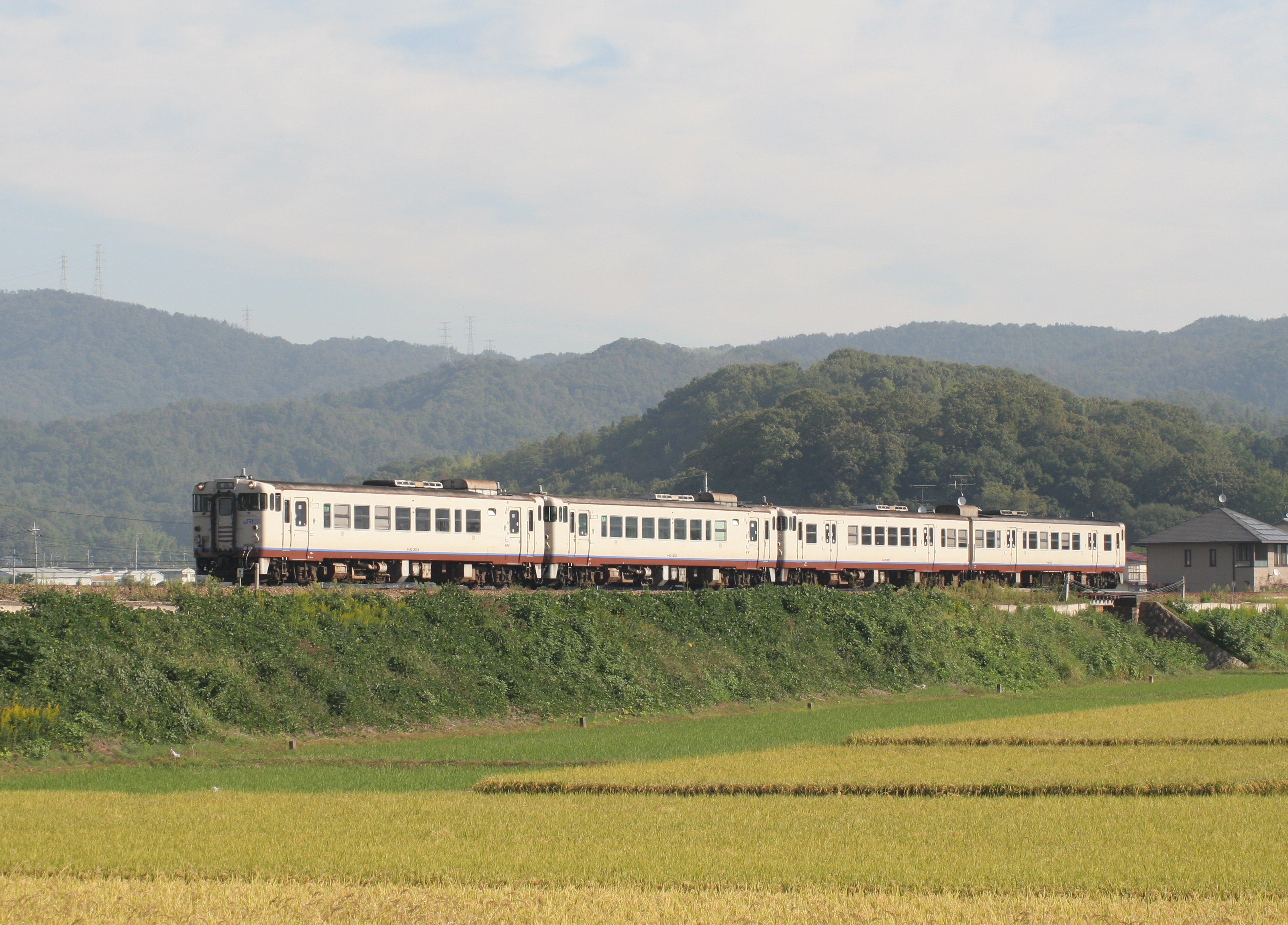 吉備線内を走行するJR西日本キハ40系気動車 キハ40・キハ47